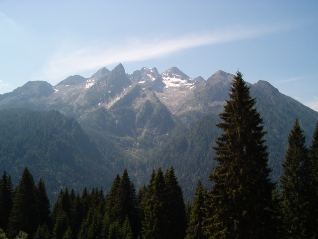 Cima d'Asta vista dall'alta Valle del Vanoi, Trentino, Italy